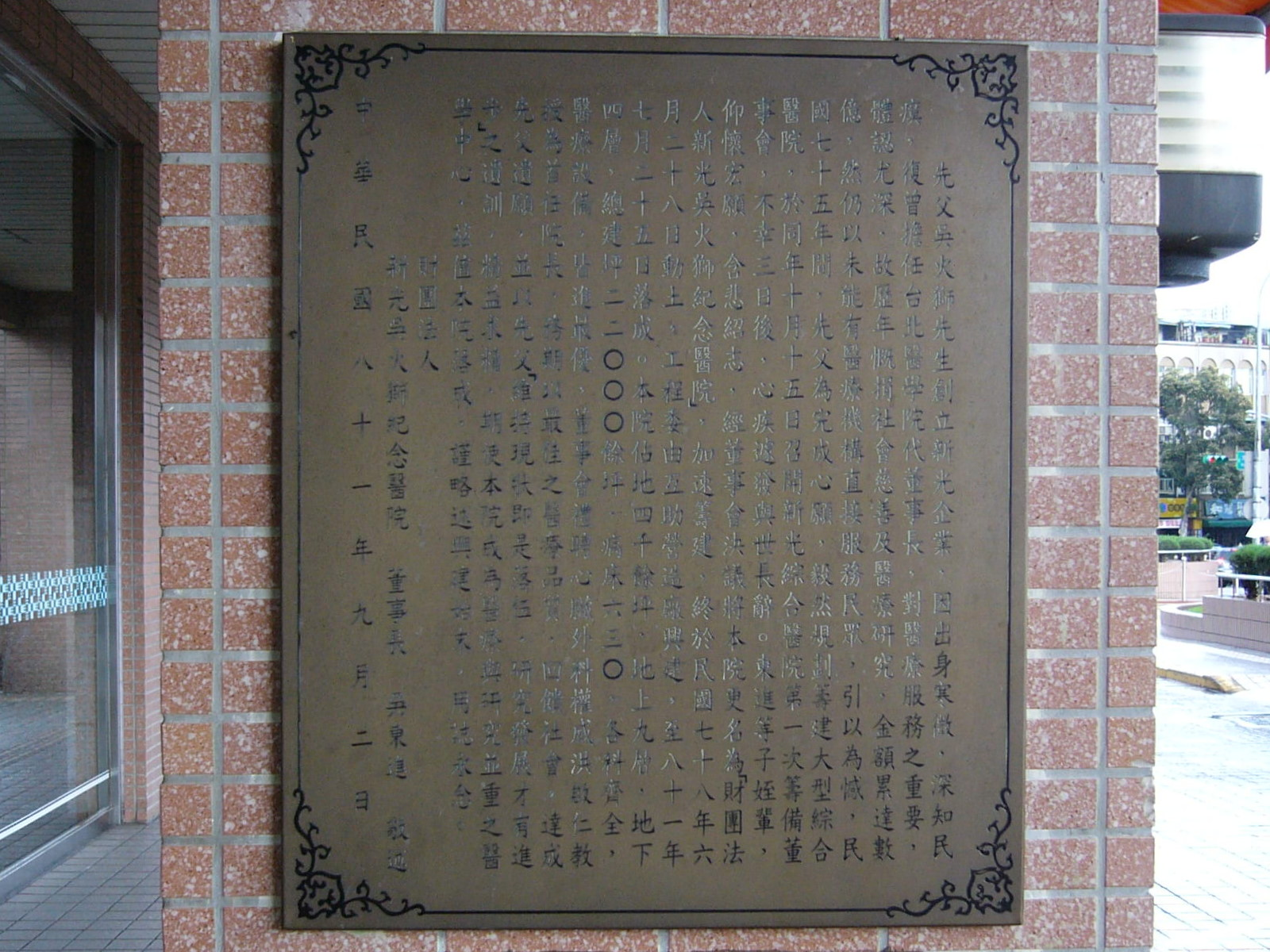 中文（台灣）: 新光吳火獅紀念醫院興建始末，1992年9月2日新光吳火獅紀念醫院董事長吳東進撰述。